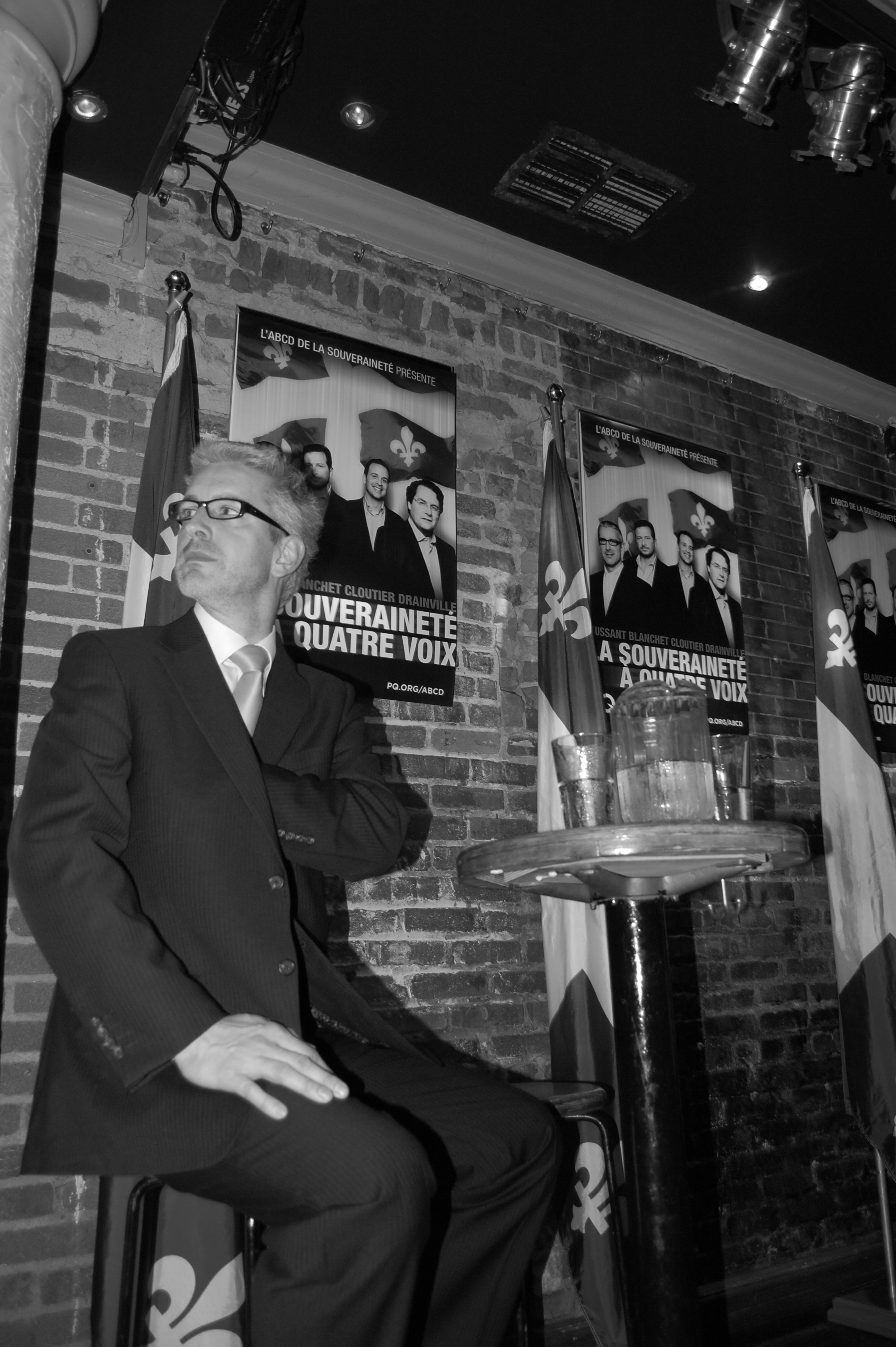 Jean-Martin Aussant lors d'une tournée de promotion de la souveraineté du Québec à Trois-Rivières.